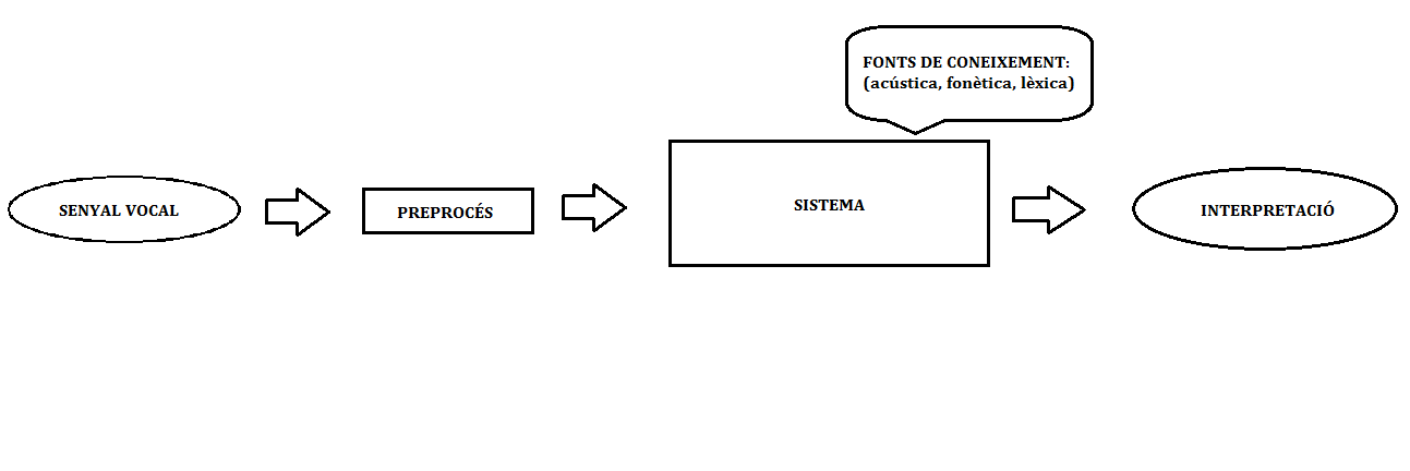 Parts fonamentals de l'esquema d'un decodificador acústic fonètic